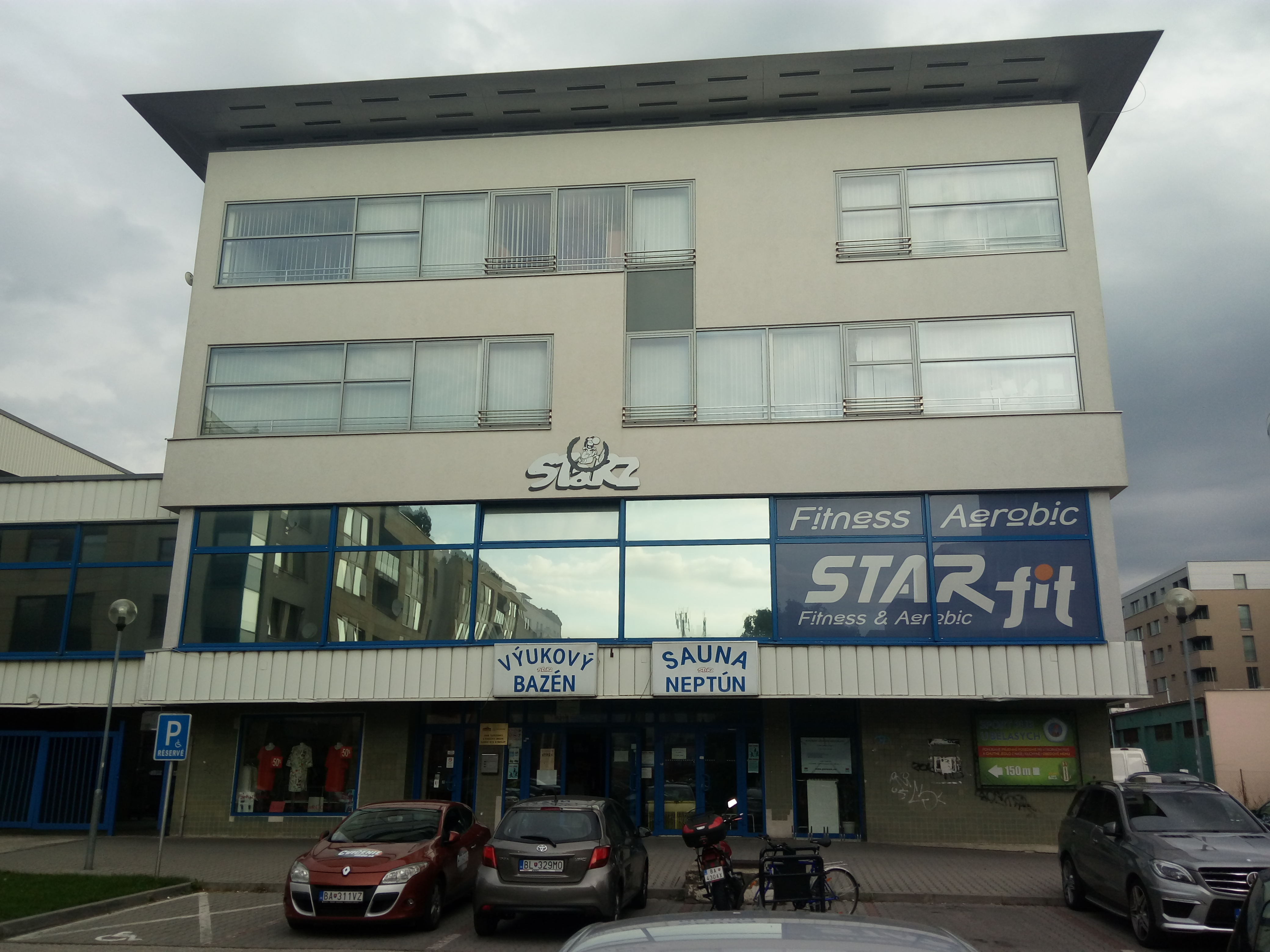 Junácka 6, Nové Mesto, Bratislava